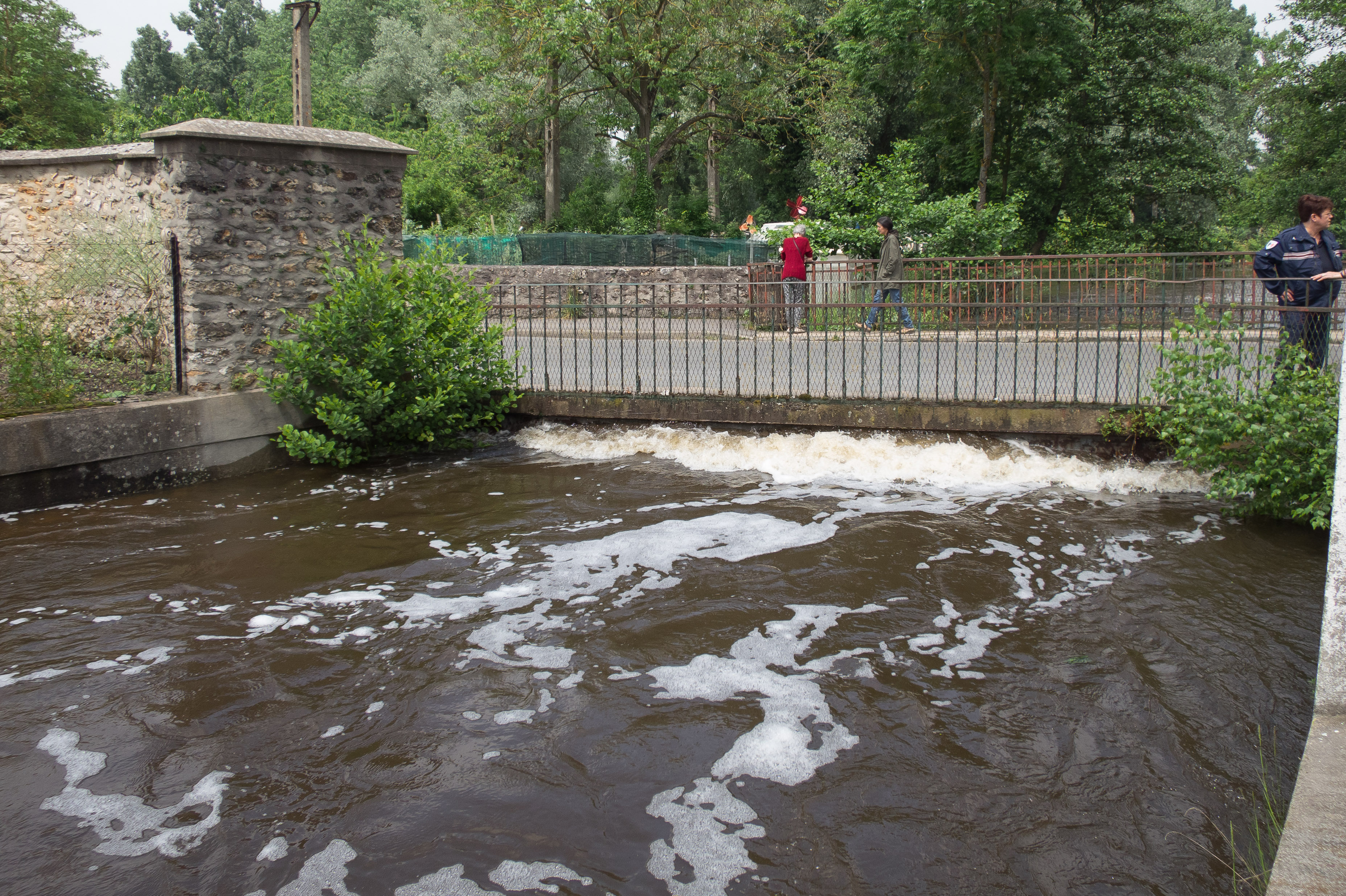 Crue de la rivière Essonne au début du mois de juin 2016, quartier de Moulin-Galant à Villabé (Esssonne, France)